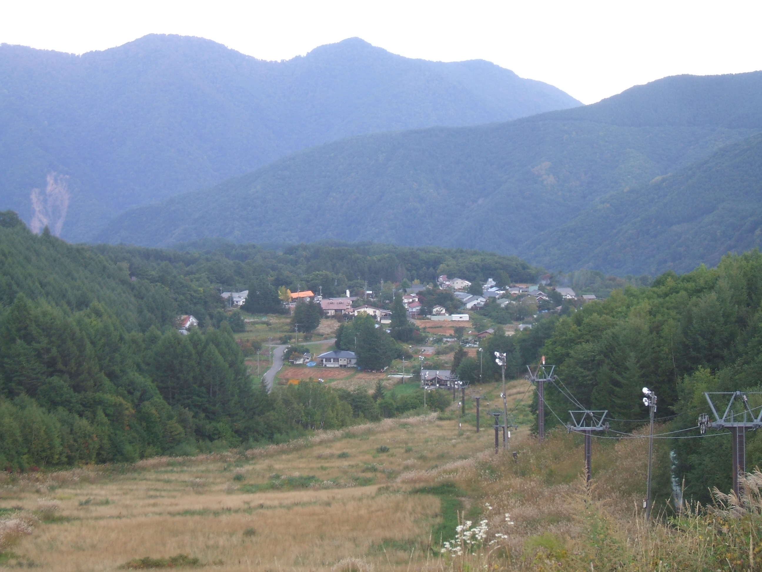 長野県松本市安曇地区で乗鞍高原にある大野川集落の1つ